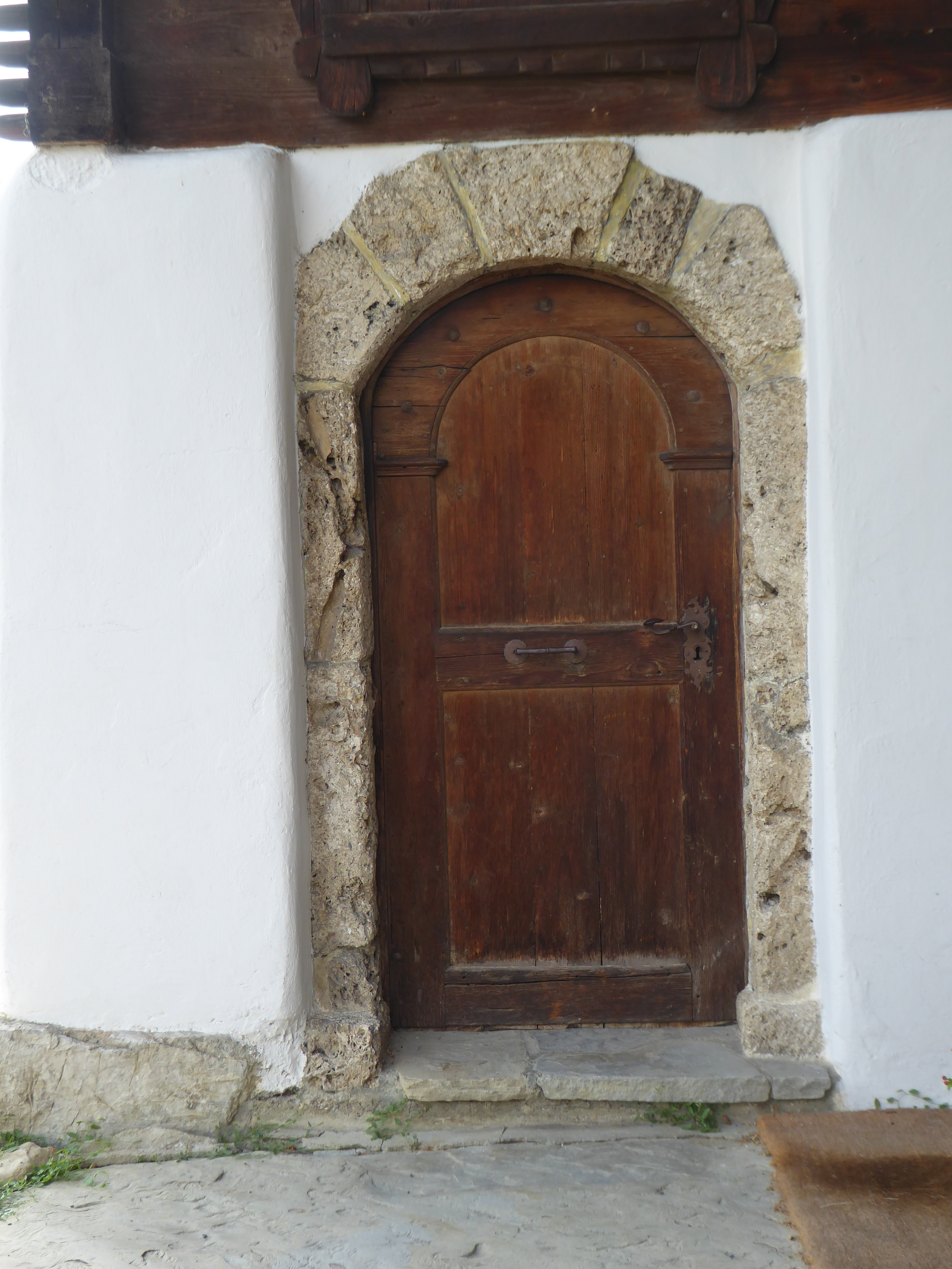 Kellerportal des Ackerhauses Ebnat-Kappel